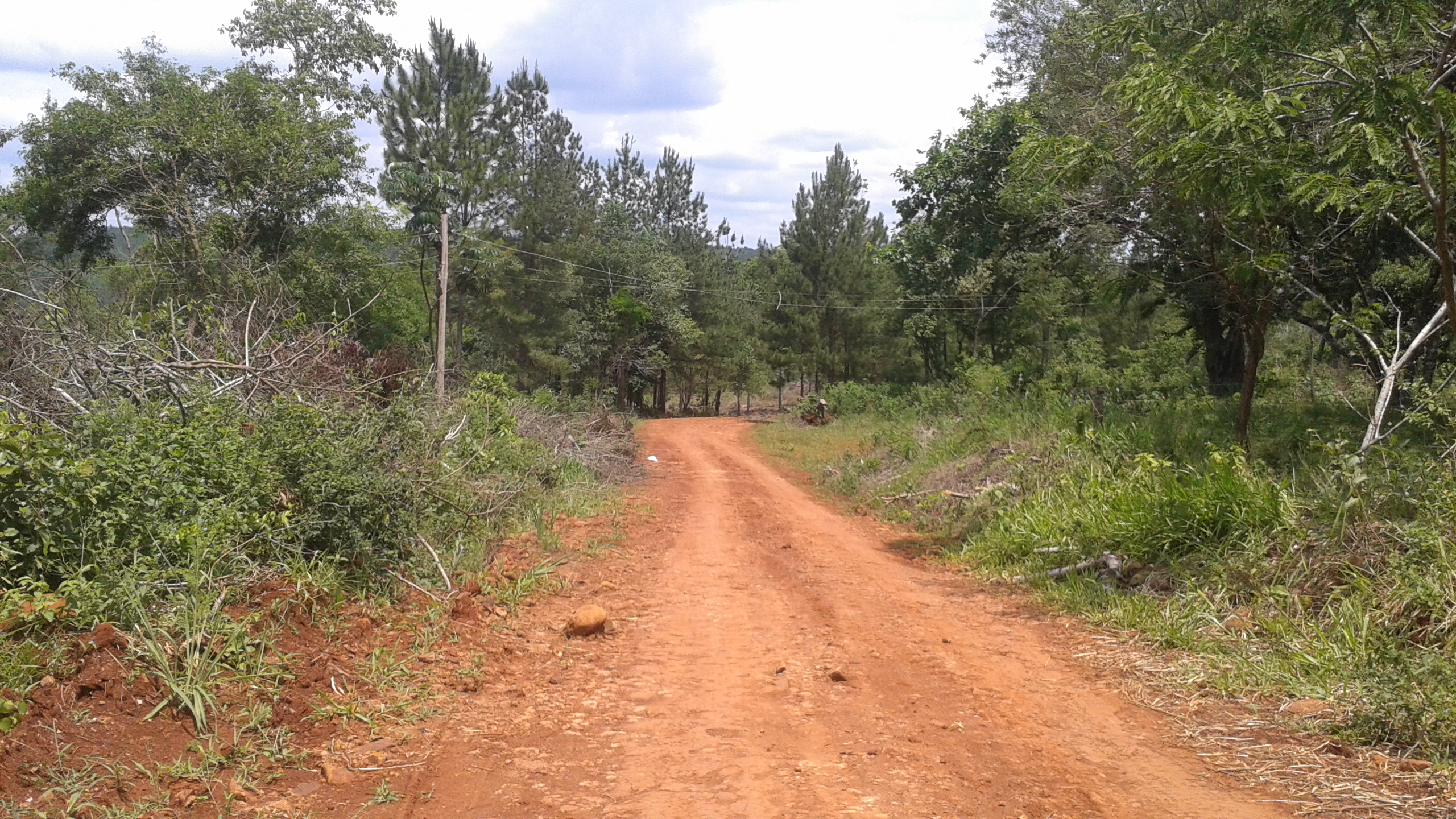 Camino hacia el Río Paraná en Puerto Mineral (Provincia de Misiones, Argentina). Fuente: Periodista Horacio Cambeiro.